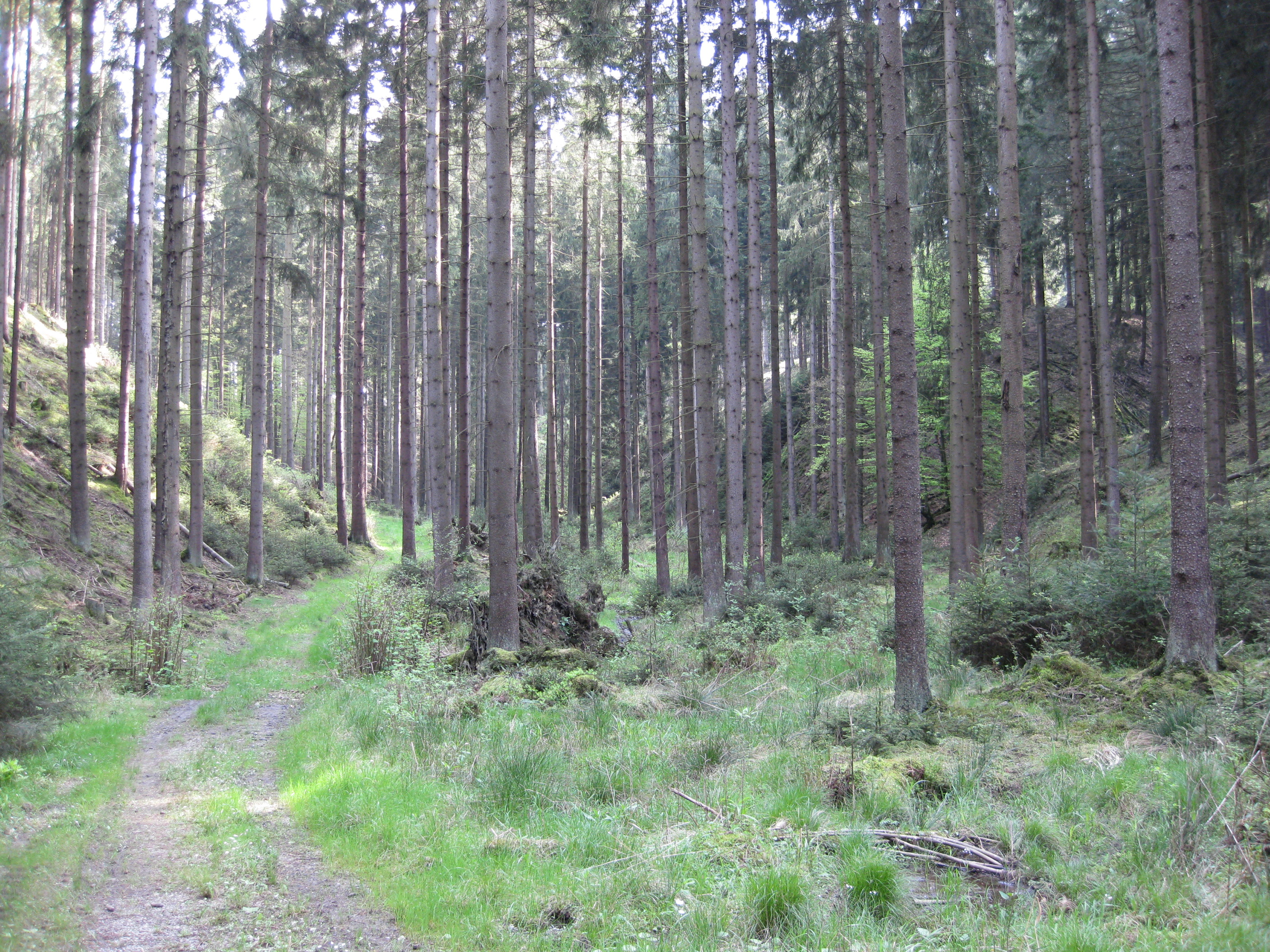 Naturschutzgebiet Steinbecke (Kerbtal im mittleren Bereich des Bachlaufs), Brilon-Scharfenberg, Nordrhein-Westfalen, Deutschland.